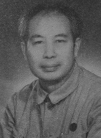 中國人民政治協商會議第一屆全體會議代表